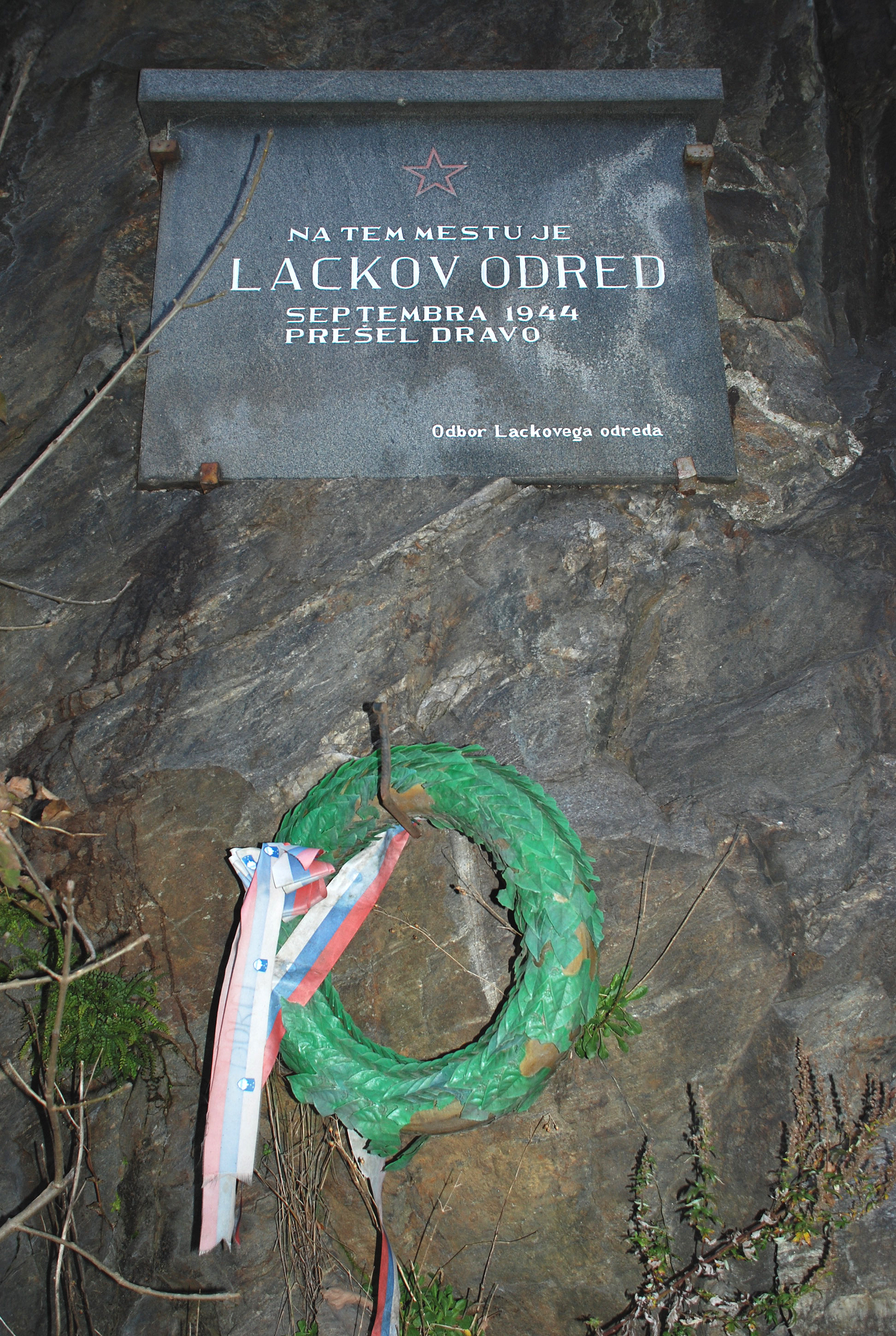 Gedenktafel ca. 200 m östlich von Ožbalt (St. Oswald im Drauwald, St. Oswald an der Drau), Slowenien an den Drauübergang des Lackov-Verbandes der damaligen jugoslawischen Partisanen (Kampfgruppe Lackov)